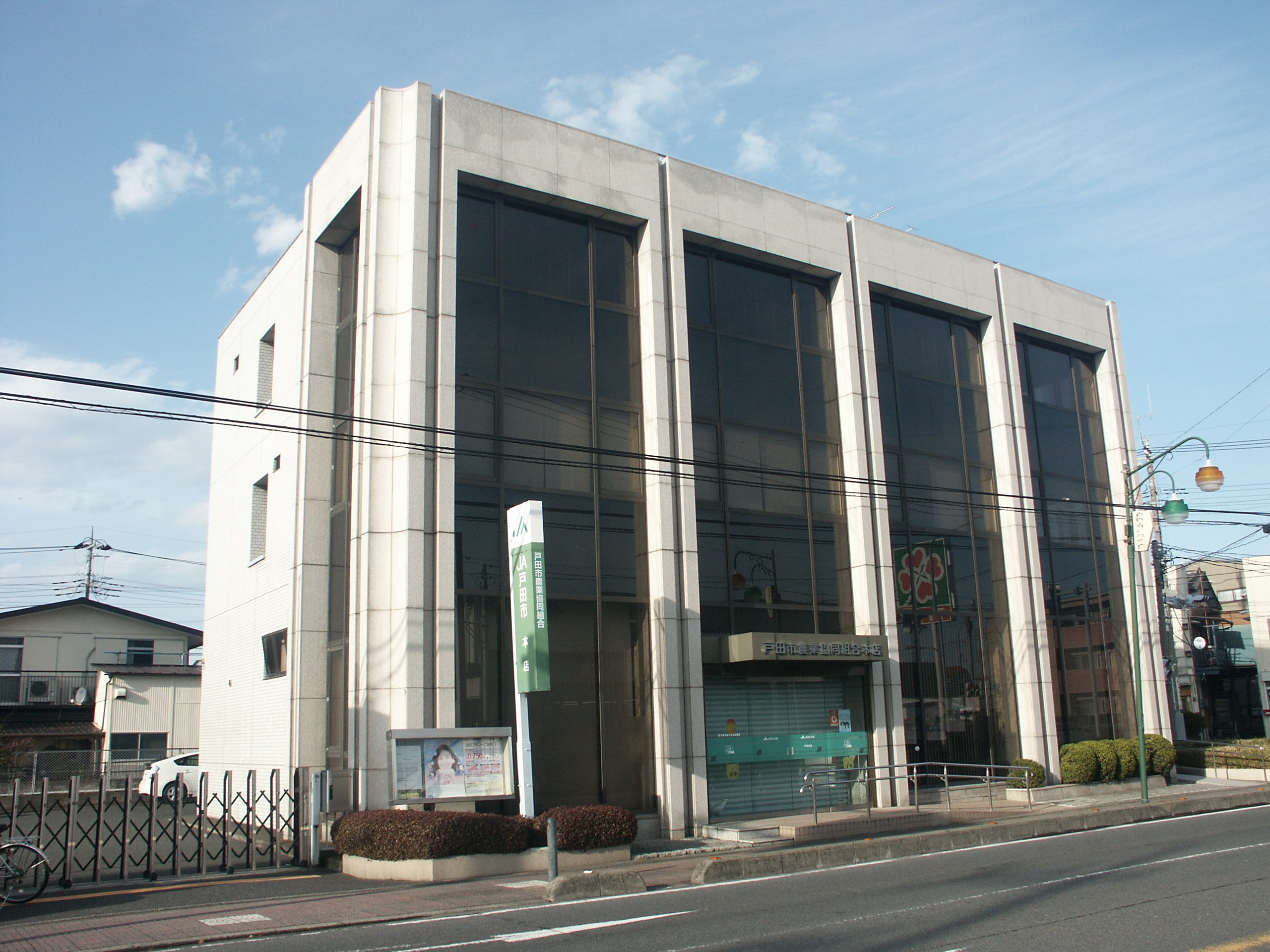 戸田市農業協同組合本店（建物南側から撮影）